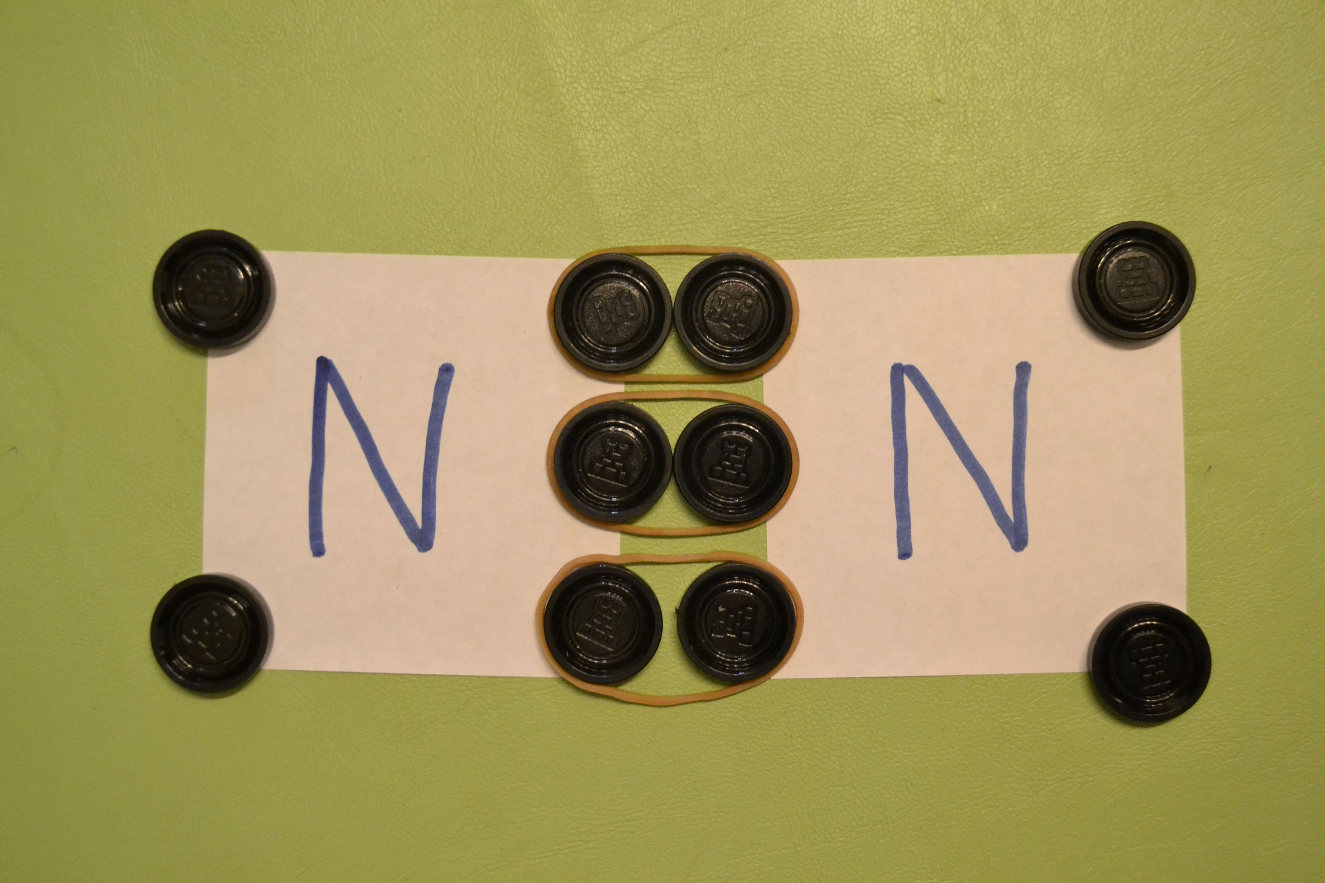 Electrones de la última capa de 2 átomos de Nitrógeno